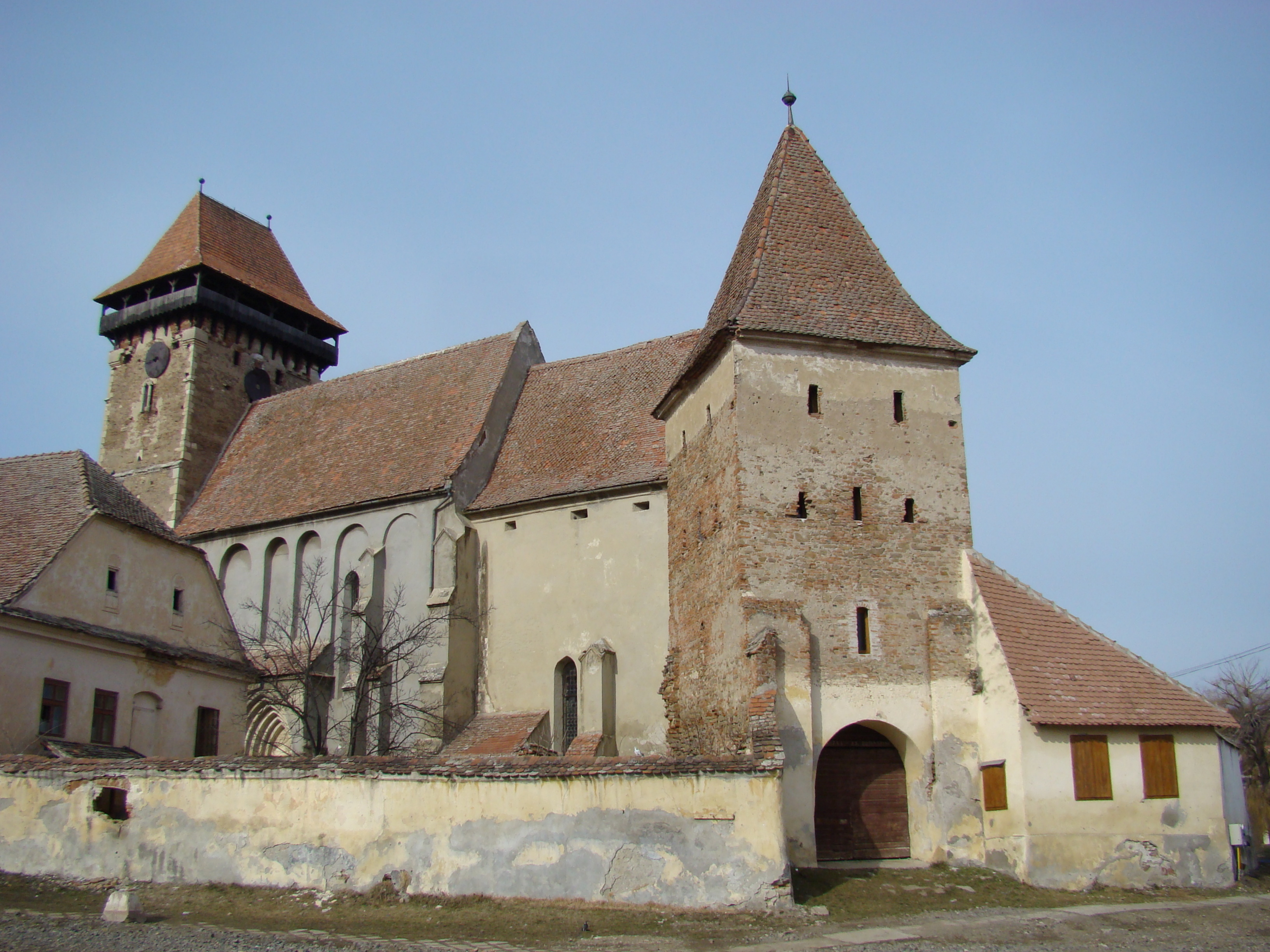 Ansamblul bisericii evanghelice fortificate, sat BĂGACIU, județul Mureș